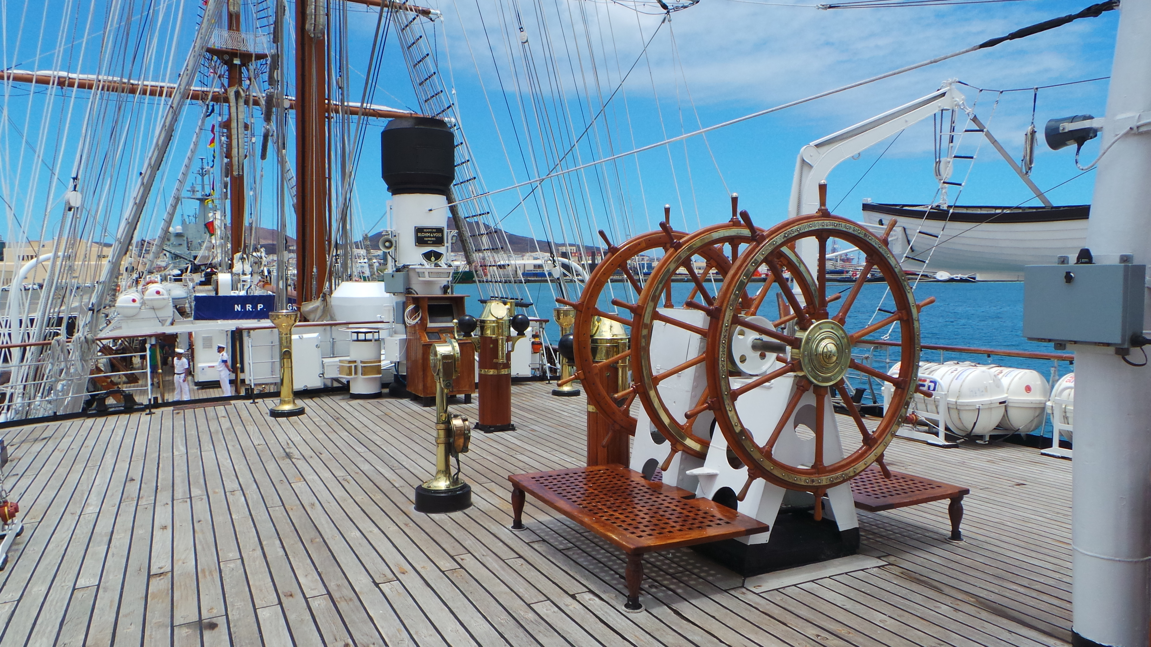 Visita al Buque Escuela NRP Sagres, en La Base Naval de Las Palmas de Gran Canaria. Este fin de semana de semana ( 20, 21 y 22 de junio de 2014) tenemos la oportunidad de disfrutar, en Las Palmas de Gran Canaria, de la visita del buque escuela portugués NRP Sagres, se encuentra atracado en el muelle de la base naval y podrá ser visitado hoy viernes hasta las 19h y mañana sábado de 10 a 12h y de 14 a 19h . El Buque proveniente de Lisboa partirá el domingo hasta Las Azores , para luego regresar a Lisboa, cuenta con unos 60 guardiamarines, con una decena de mujeres entre ellos, que realizan su periodo de instruccion Construido en 1937 en Hamburgo y tras varios avatares, fue adquirido en 1961 por la marina Portuguesa para sustituir al Sagres II, entrando en servicio como Sagres III en febrero de 1962. Tiene 89,5 metros de eslora, 12 de manga y 5,5 de calado, siendo su altura máxima de 45,5 metros. Cuenta además con 1.971 metros cuadrados de vela y desplaza 1.893 toneladas. La figura del mascarón de proa del Sagres III es el Infante D. Henrique nacido el 4 de marzo de 1394, siendo uno de los impulsores de la expansión y descubrimientos portugueses de la época. Más información del Buque : Web del Buque